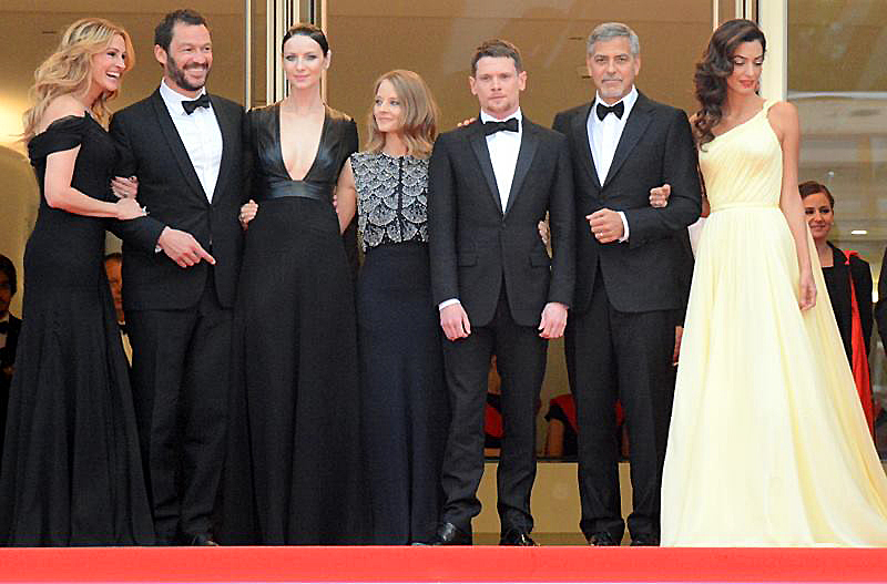 Présentation de "Money Monster" au festival de Cannes. De droite à gauche : Julia Roberts, Dominic West, Caitriona Balfe, Jodie Foster, Jack O'Connell, George Clooney, Amal Clooney.